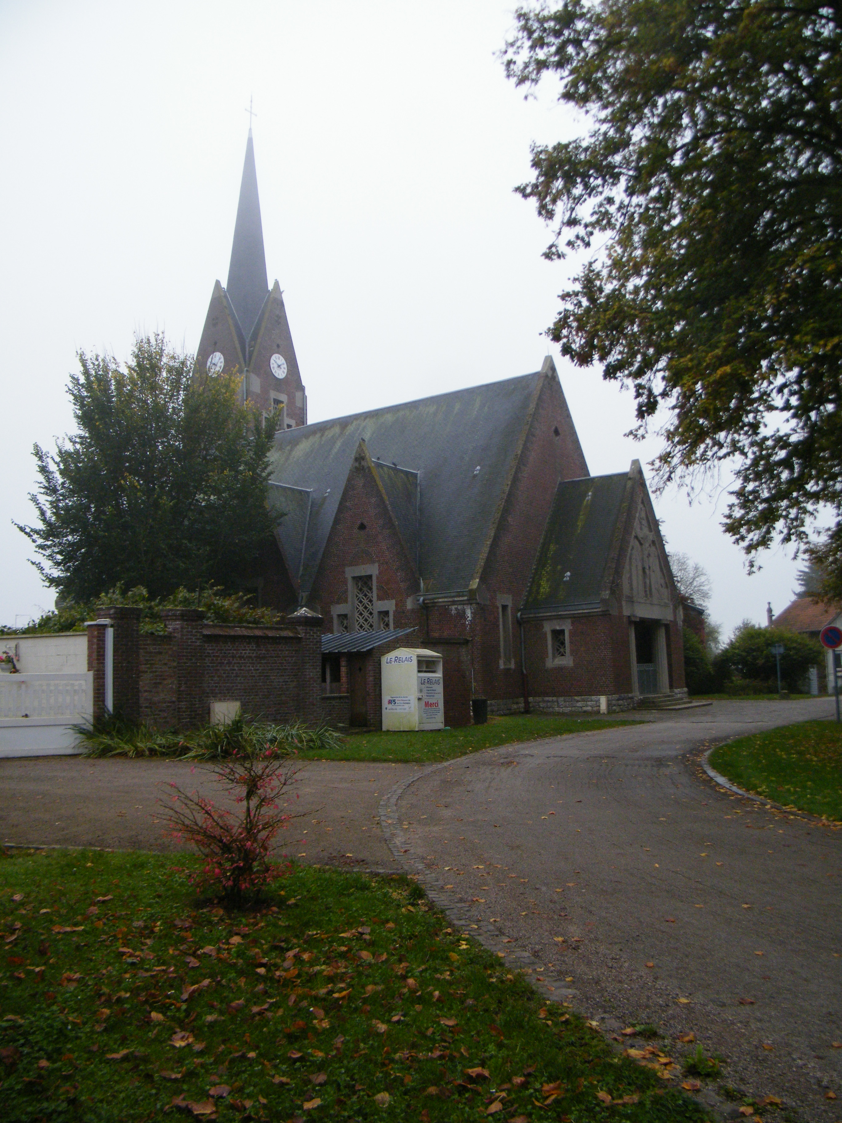 église.